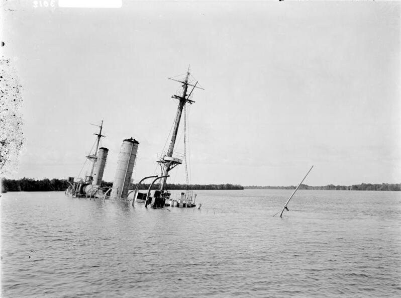 Kreuzer Königsberg zerschossen Information added by Wikimedia users.